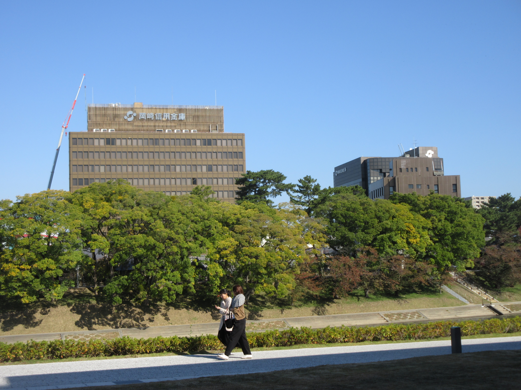 岡崎信用金庫本店（岡崎市菅生町）